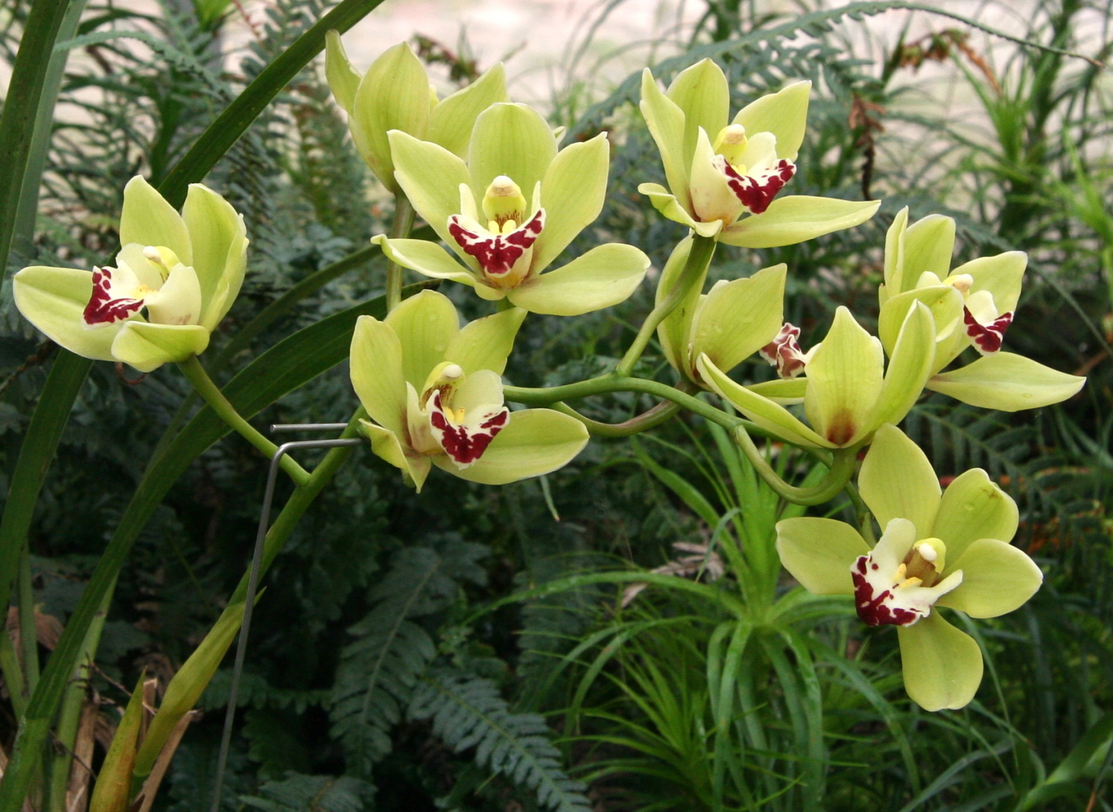 Cymbidium Hybride im Botanischen Garten Dresden